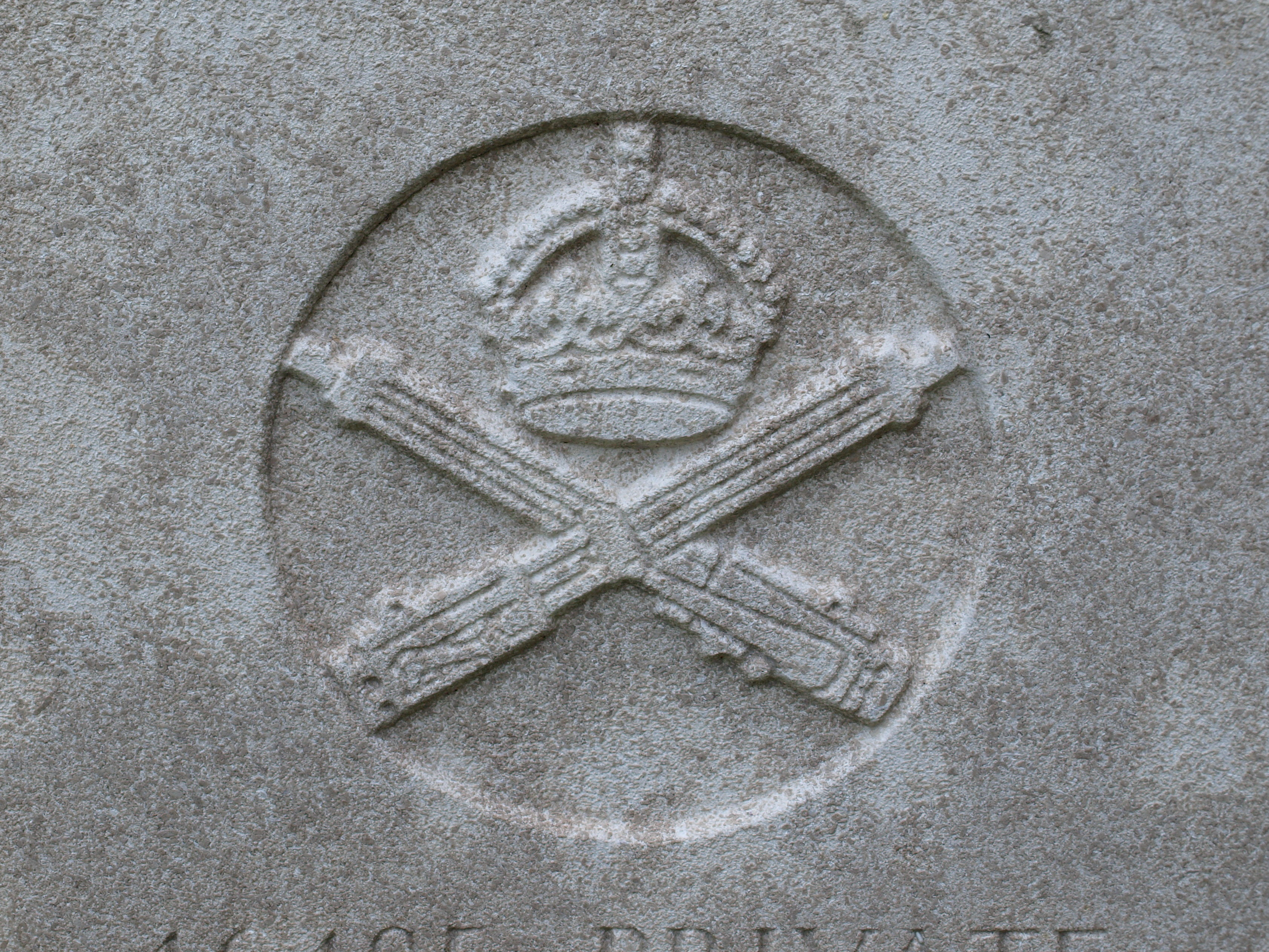 Cimetière militaire de Chestres (Vouziers, Ardennes, France)